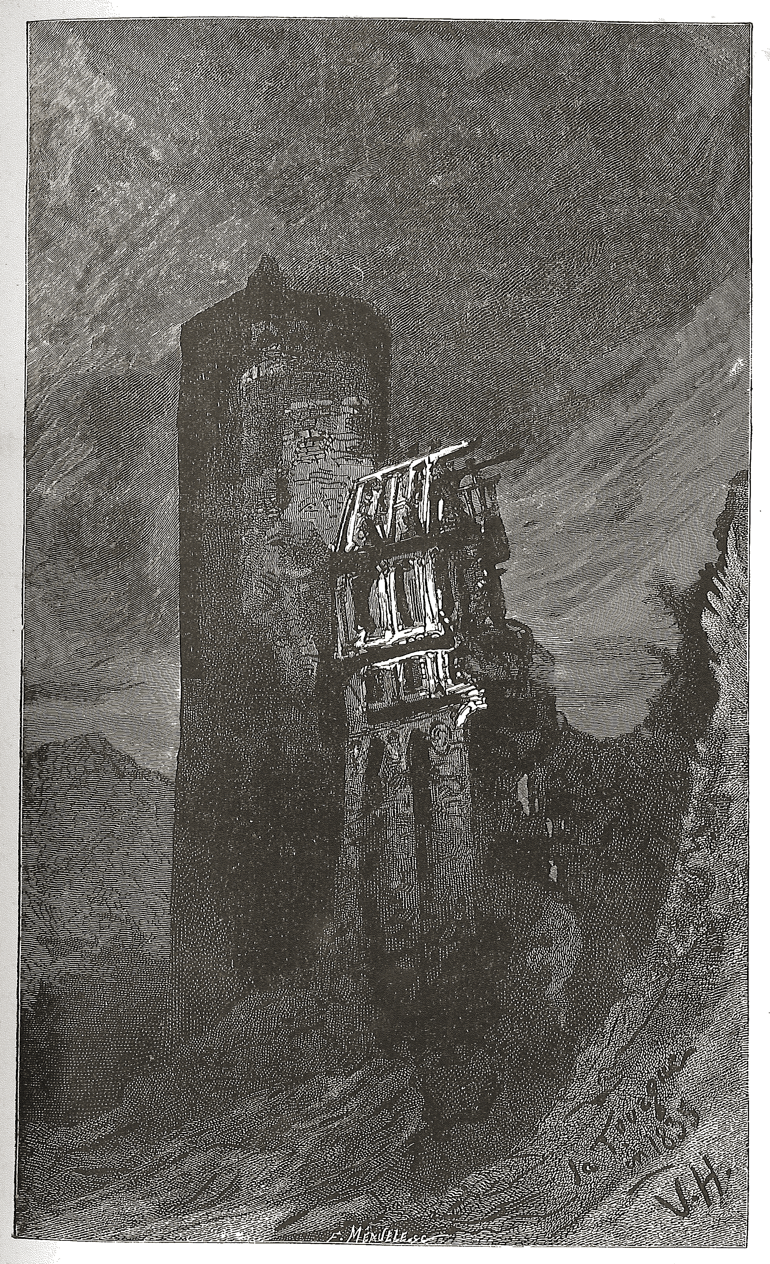 Illustration du livre Quatre Vingt Treize de Victor Hugo, édition 1874.